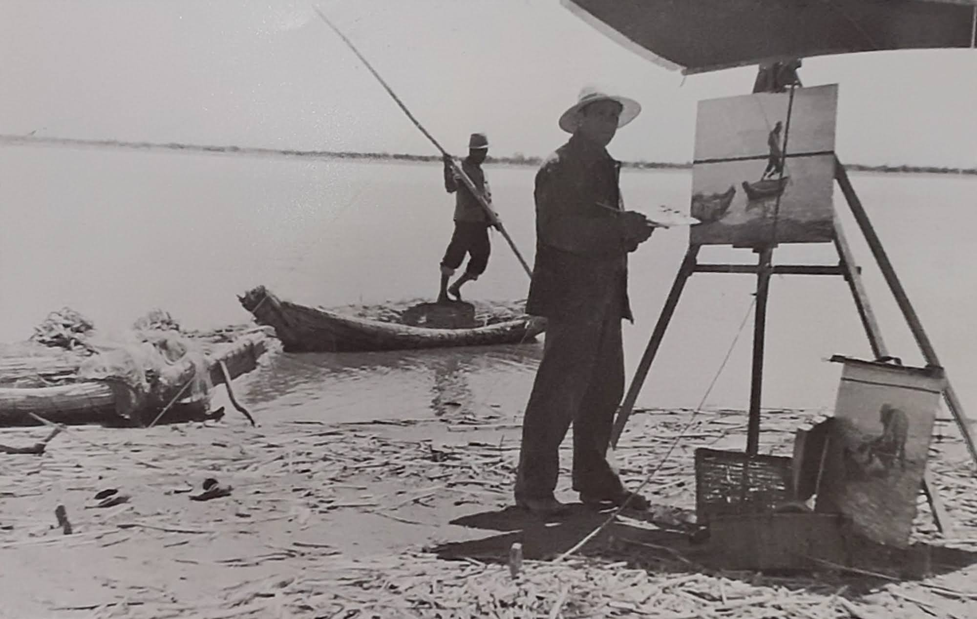 Pintor retratando a un hombre lugareño en una balsa en las lagunas de Guanacache, Lavalle, Mendoza.